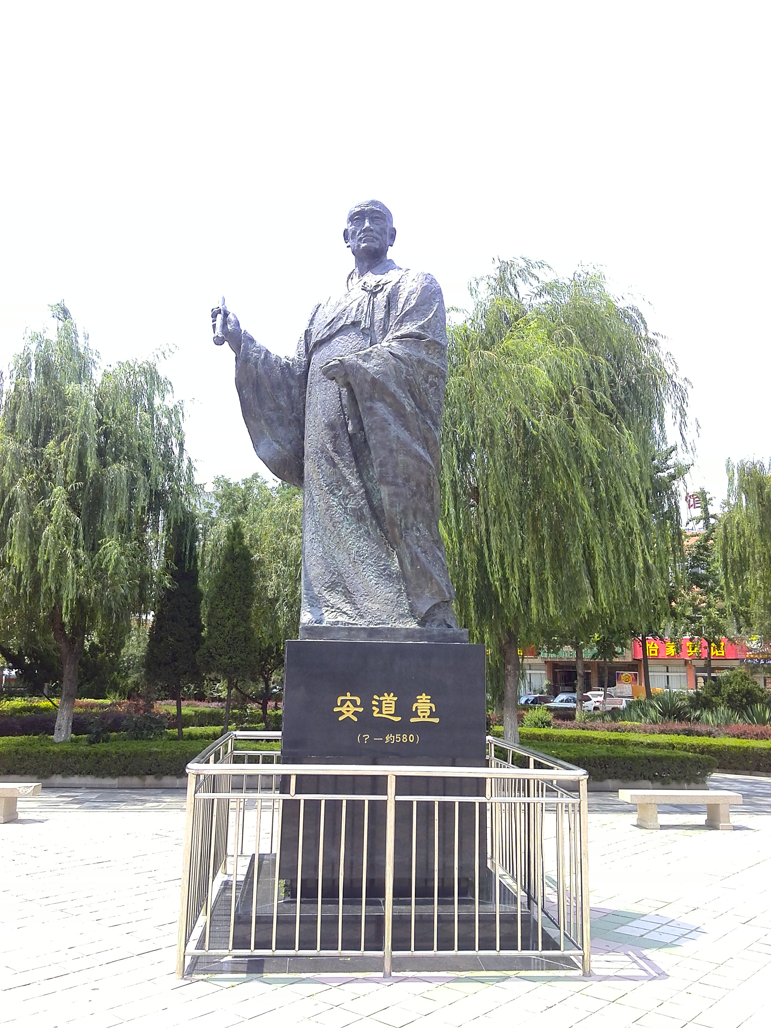 平湖广场安道壹像